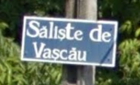 Saliste de Vascau